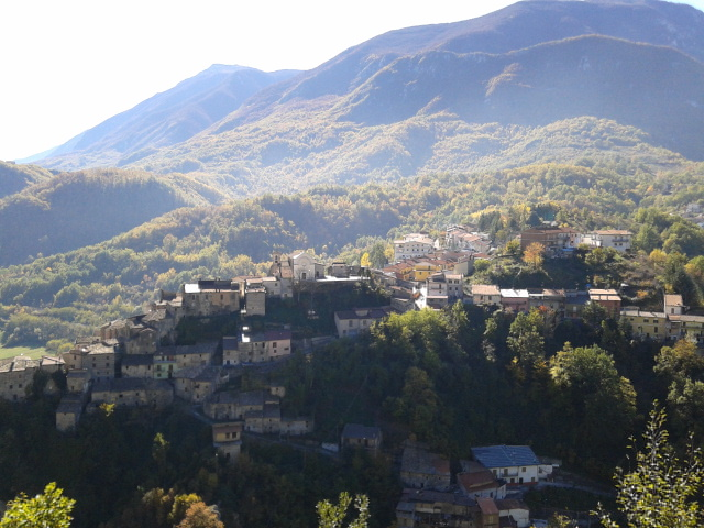 Foto panoramica di Pescocanale